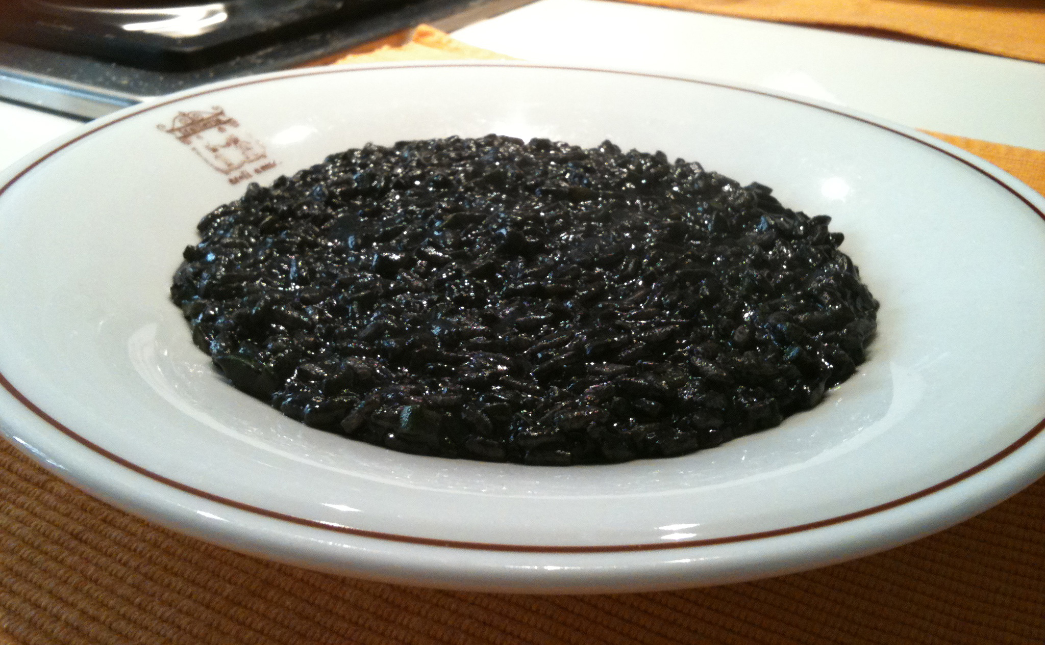 Risotto al nero di seppia con brunoise di zucchine croccanti.